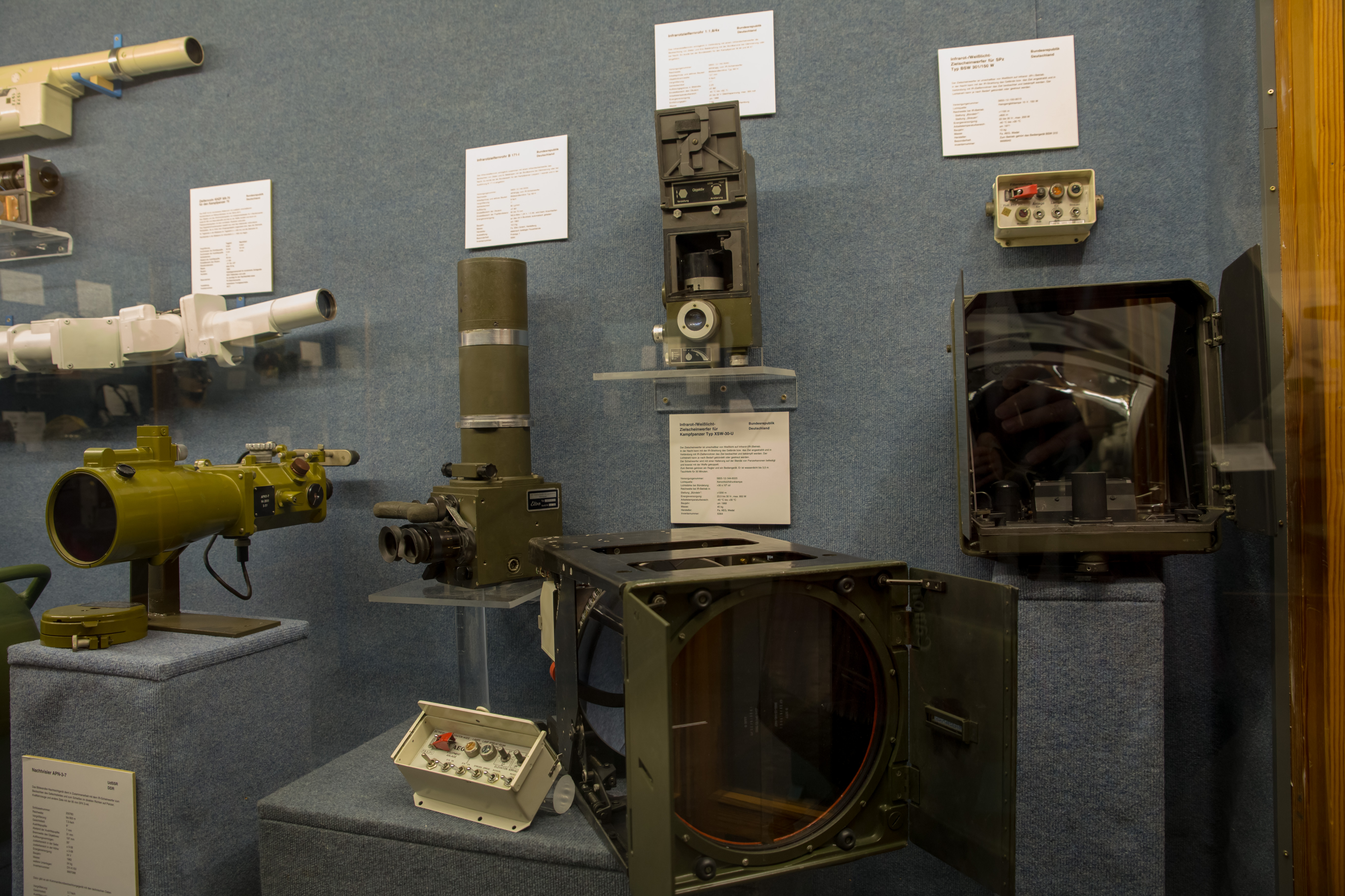 Wehrtechnische Sammlung der Bundeswehr